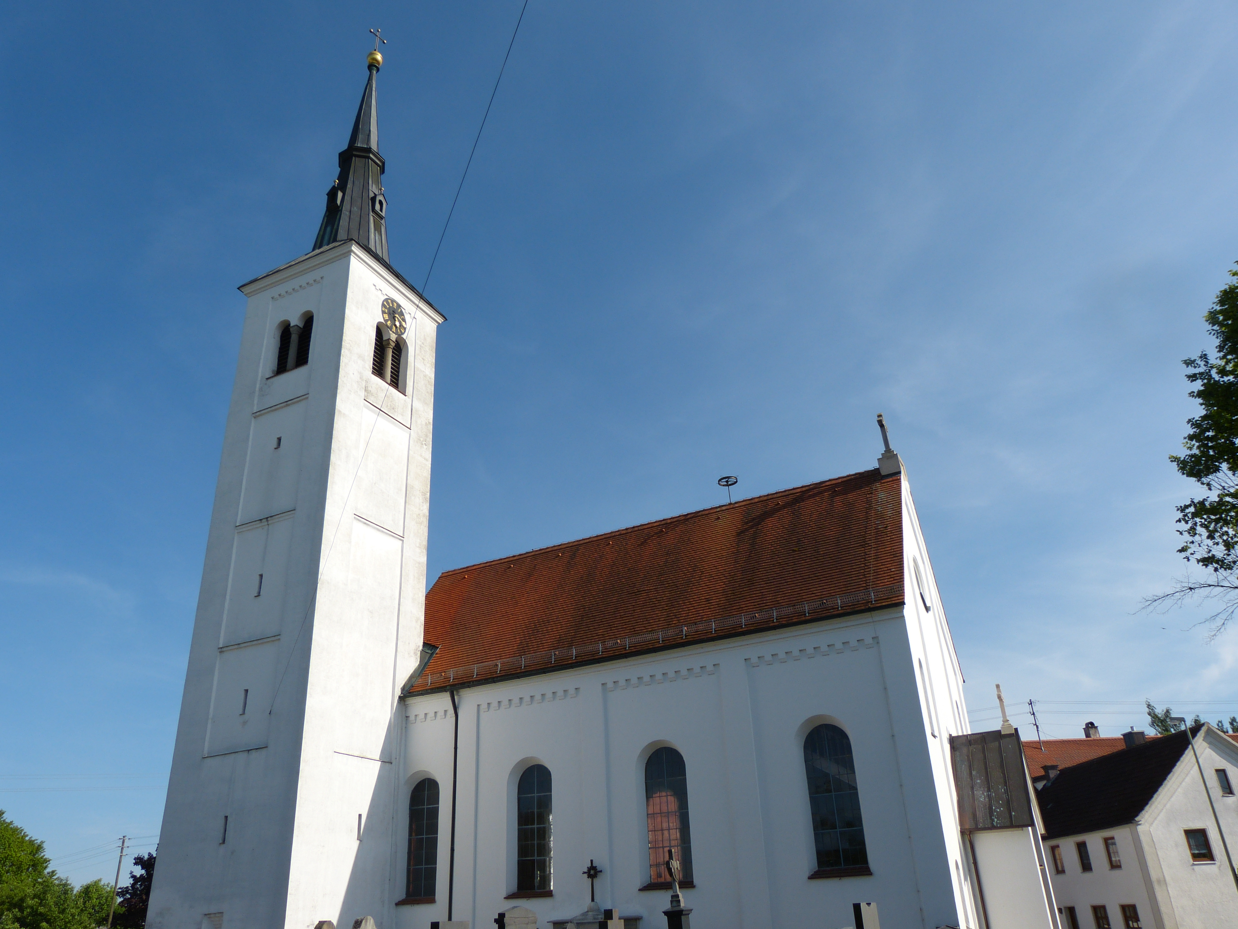 Heilige Sieben Brüder, Unterrieden, Landkreis Unterallgäu, Bayern